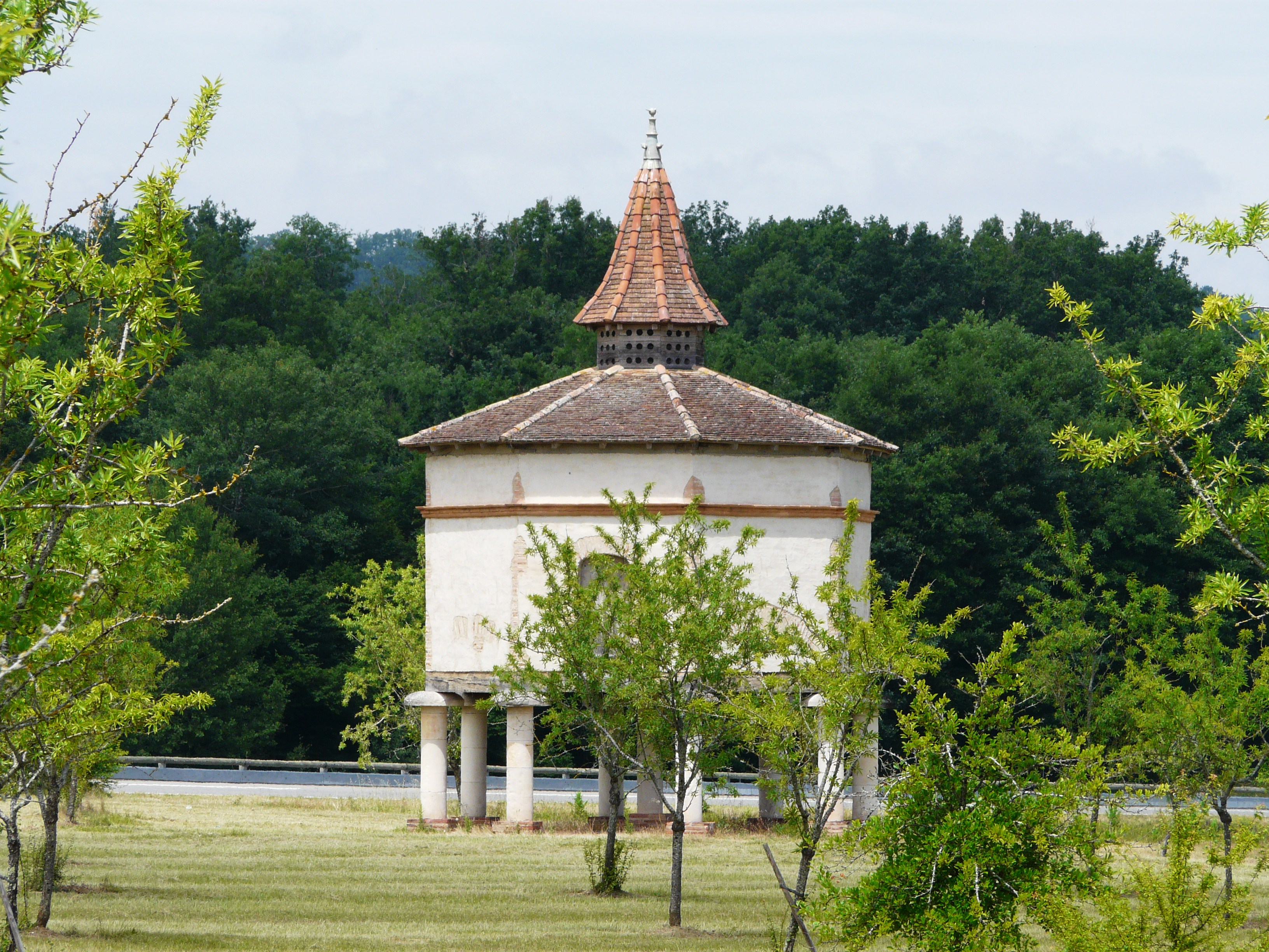 Pigeonnier de l'aire de service du Bois de Dourre, Montalzat, Tarn-et-Garonne, France.